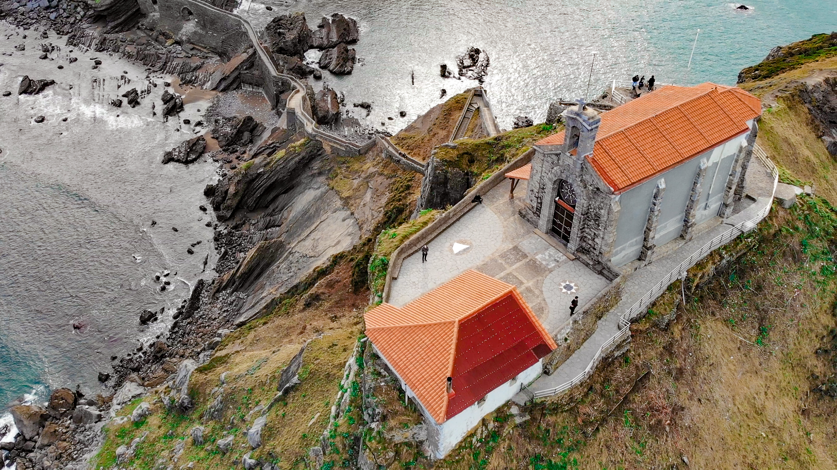 Gaztelugatxe vue drone vue arriere